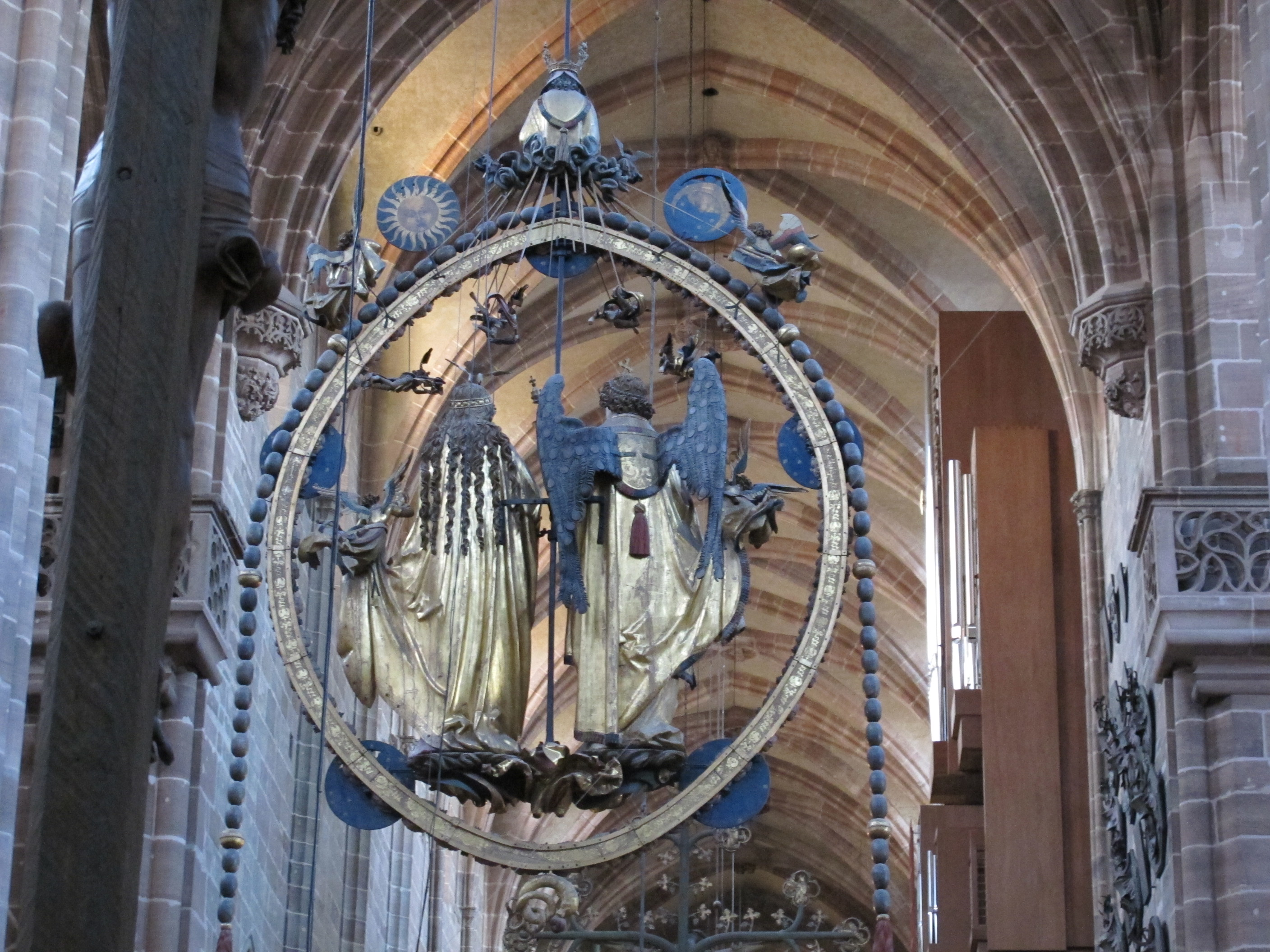 Englischer Gruß (St. Lorenz, Nuremberg)